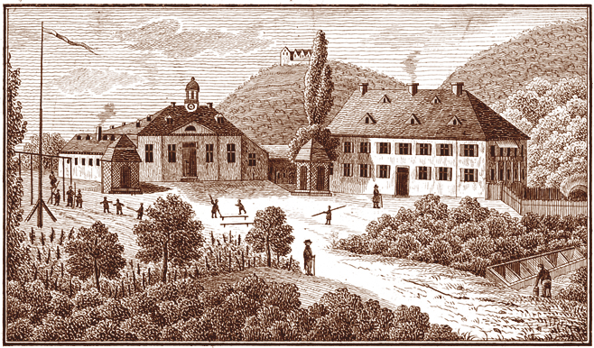 Radebeul, Grundhof, Lithografie um 1830